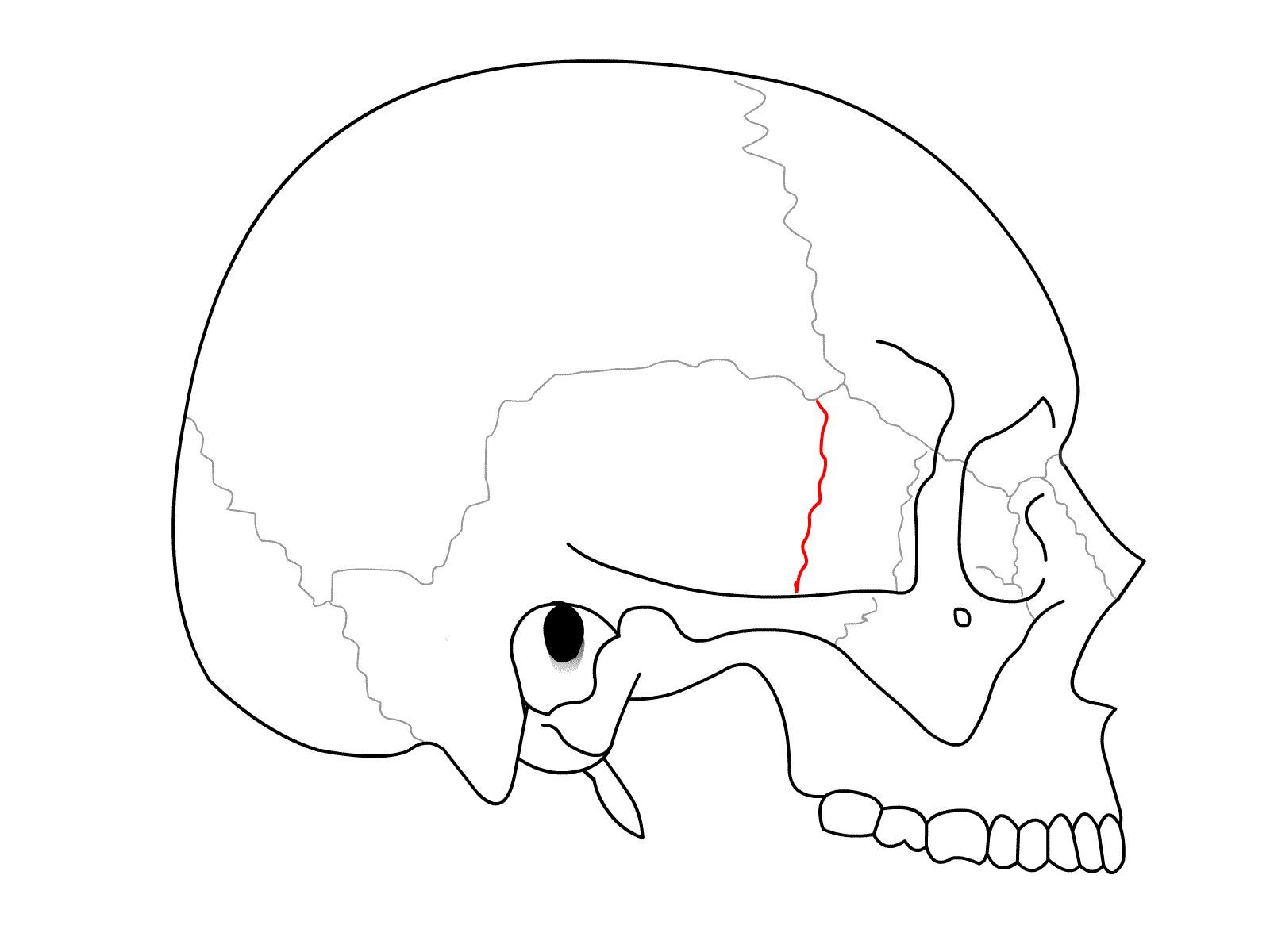 Schädel seitlich - Sutura